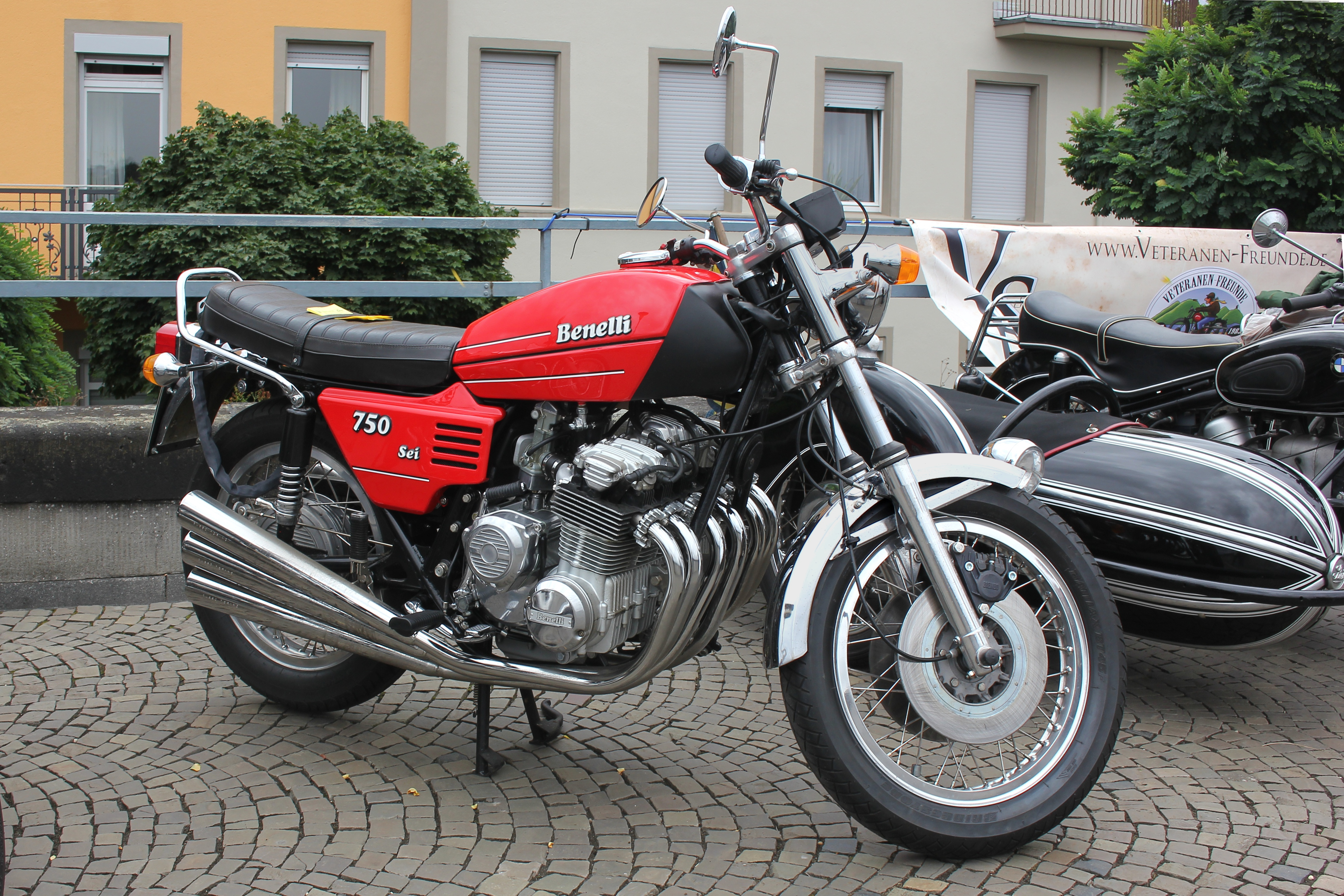 Benelli 750 Sei, 6-Zylinder-Motor, 63 PS bei 8500/min; Bauzeit 1974 bis 1977